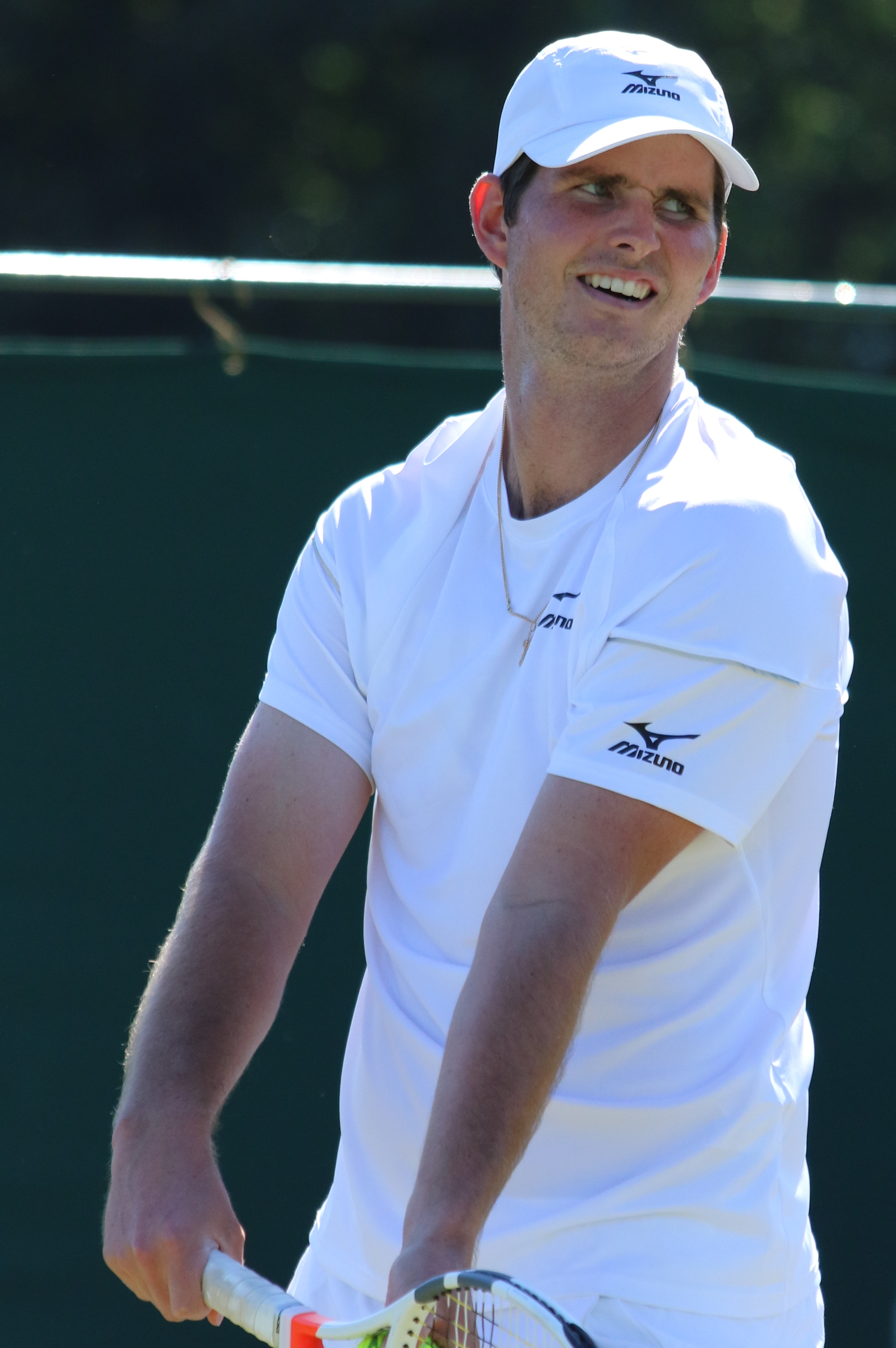 Novikov WMQ18 (16)